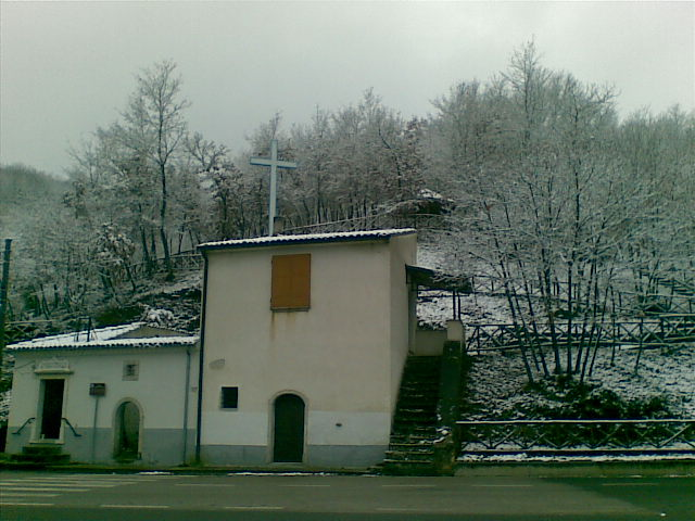 Sturno, provincia di Avellino, Italia - Cappella con neve.